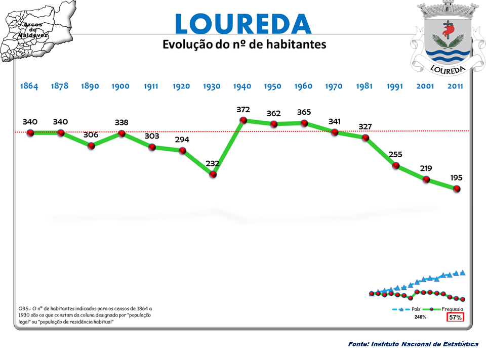 Censos 1864/2011